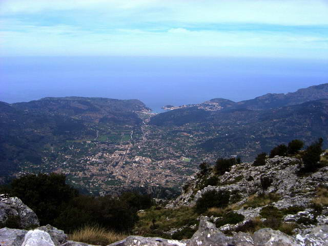 Sóller, vist des d'Alfàbia. Mallorca.